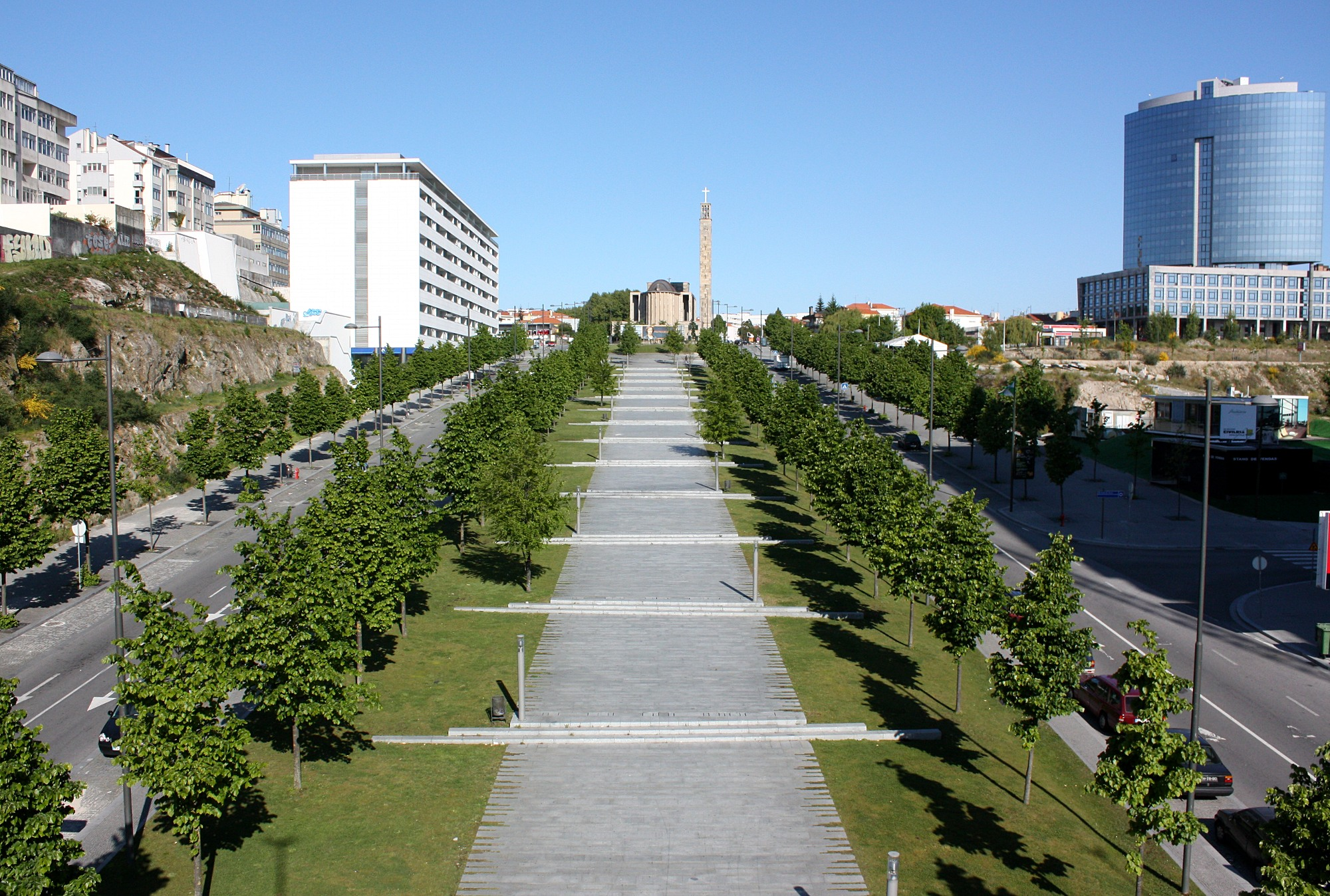 Alameda das Antas, Campanhã, Porto